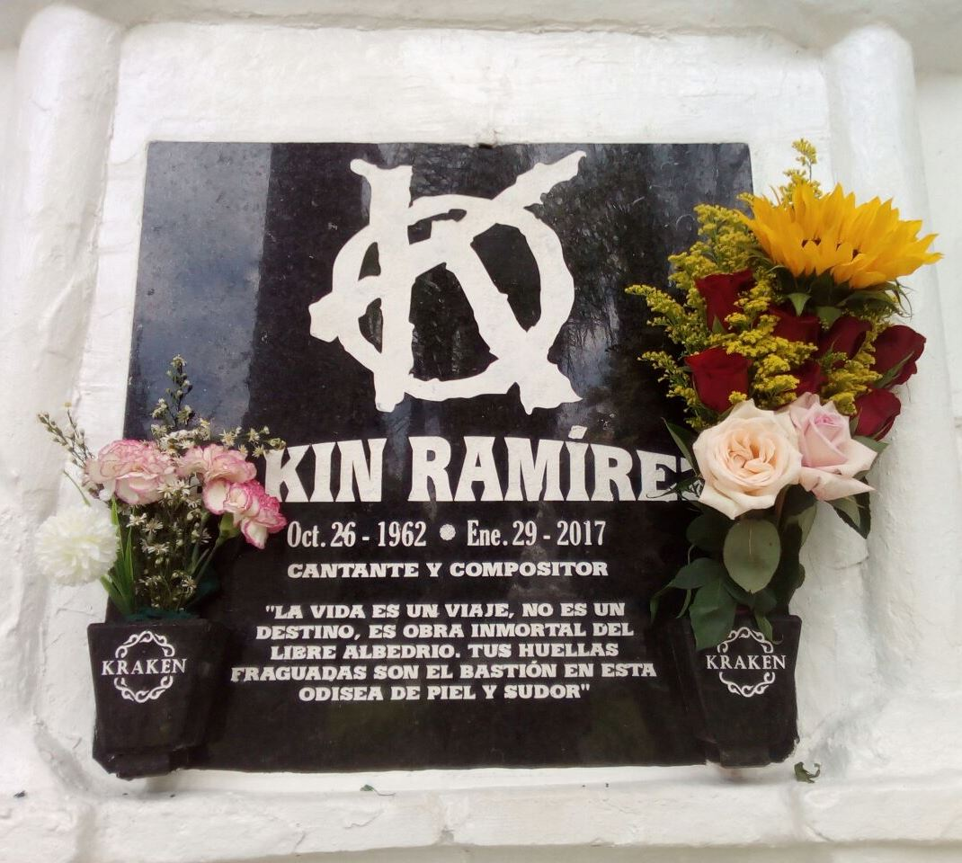 Boveda en la que descansan los restos de Elkin Ramirez, El Titan del Rock Colombiano.